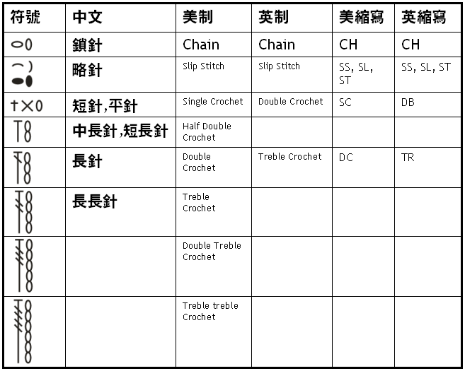 Crochet terms in zh, us, uk language